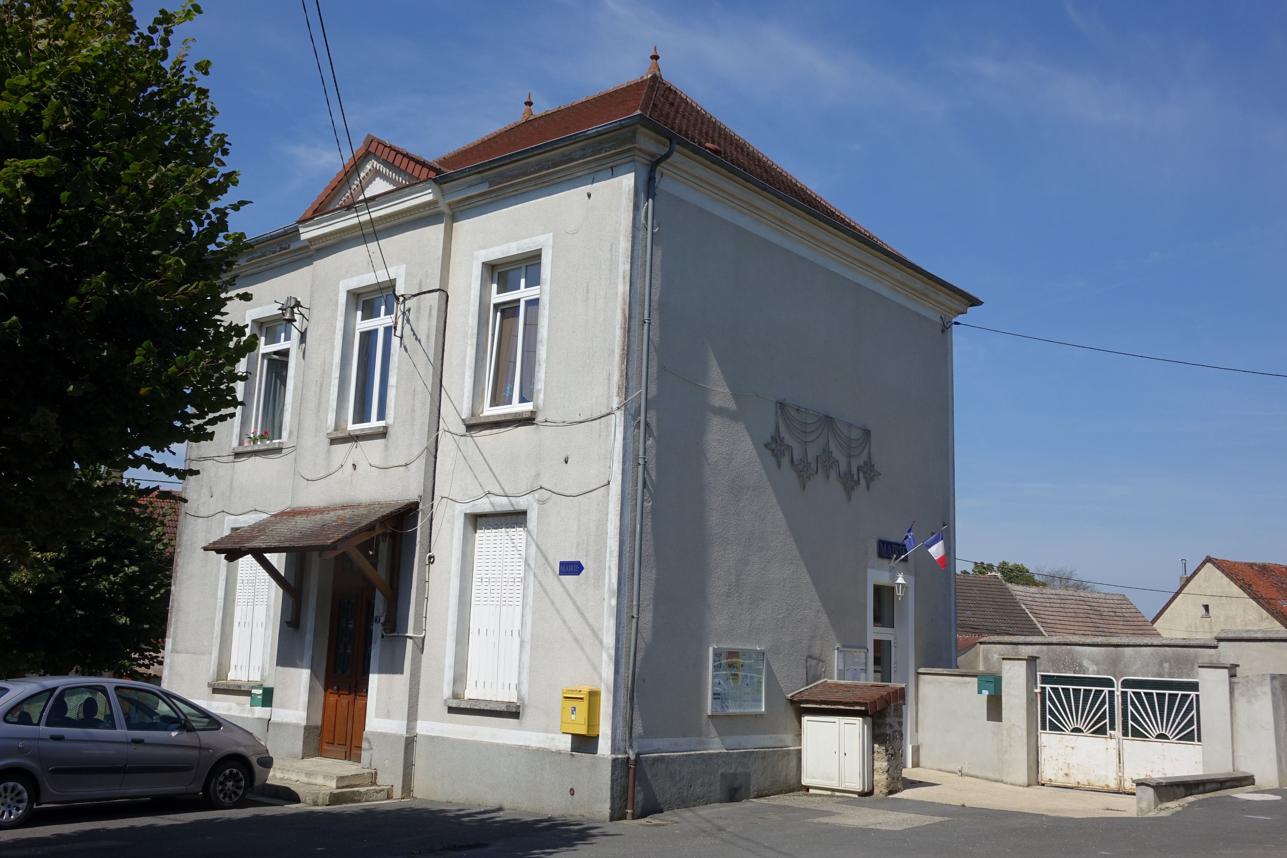 Mairie de Ronchères, Aisne, France